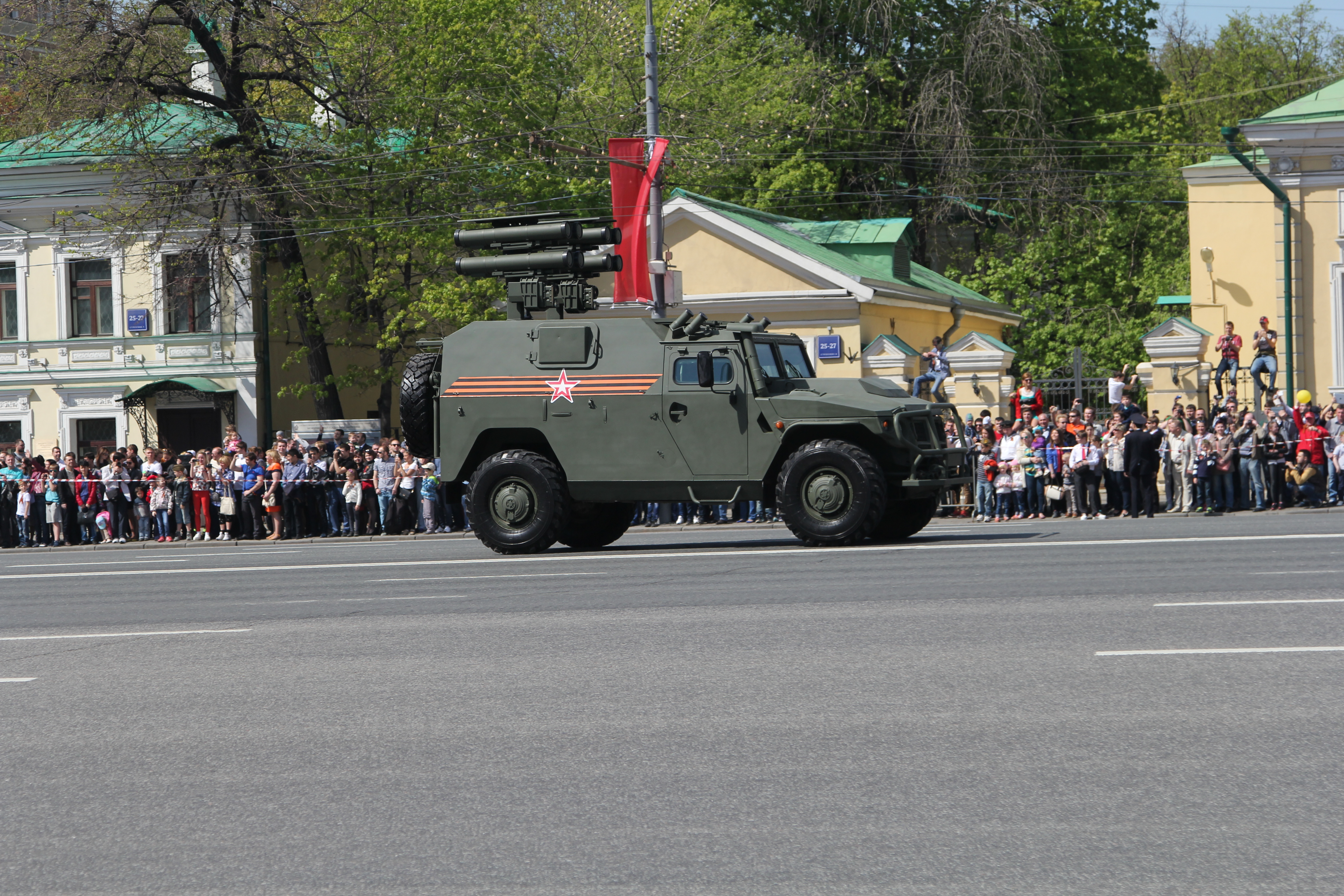 Корнет-Д1 - самоходный противотанковый комплекс